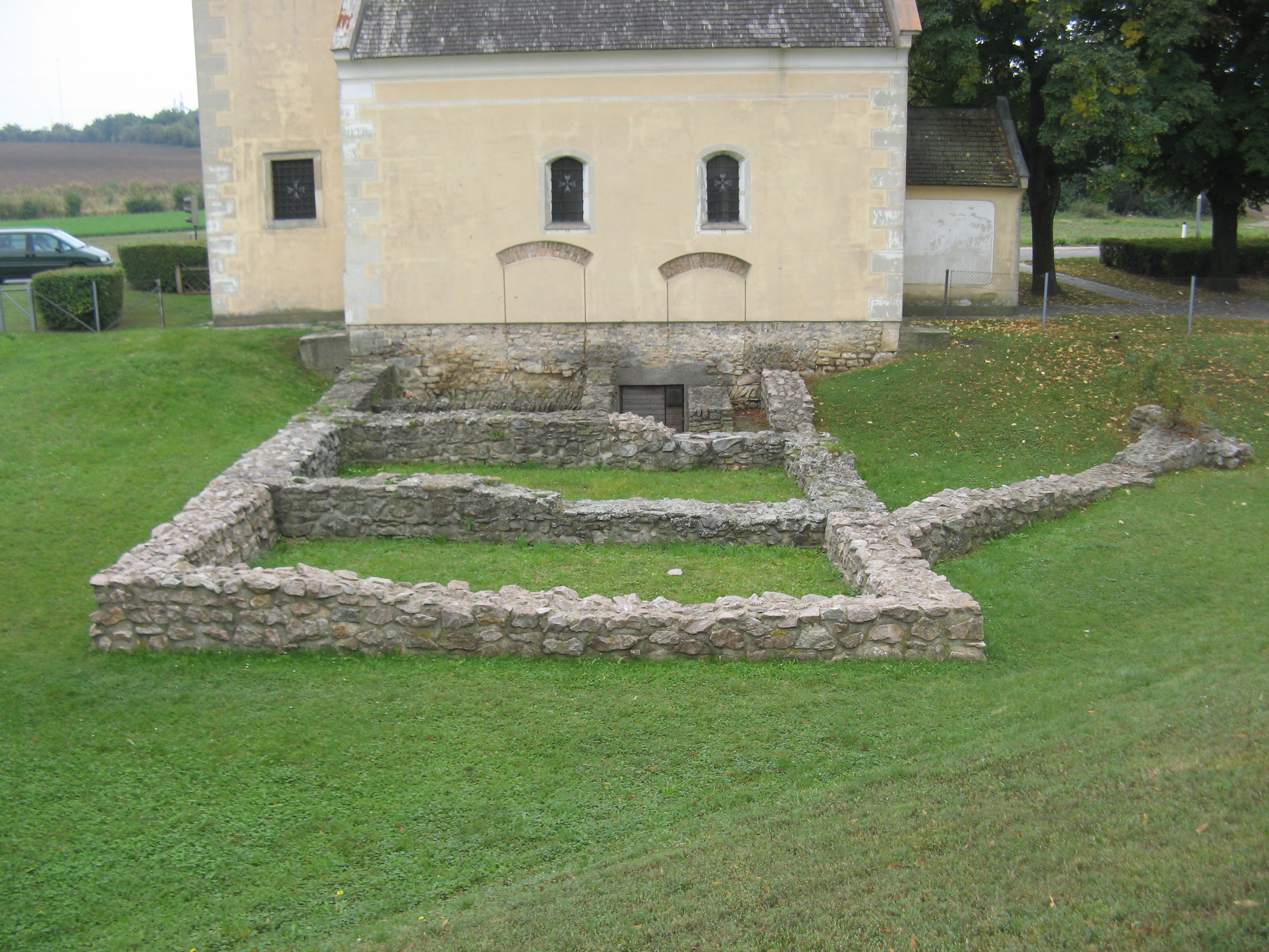 Ausgrabungen bei der Filialkirche Hl. Johannes der Täufer, Klederinger Straße, Unterlaa, Wien-Favoriten